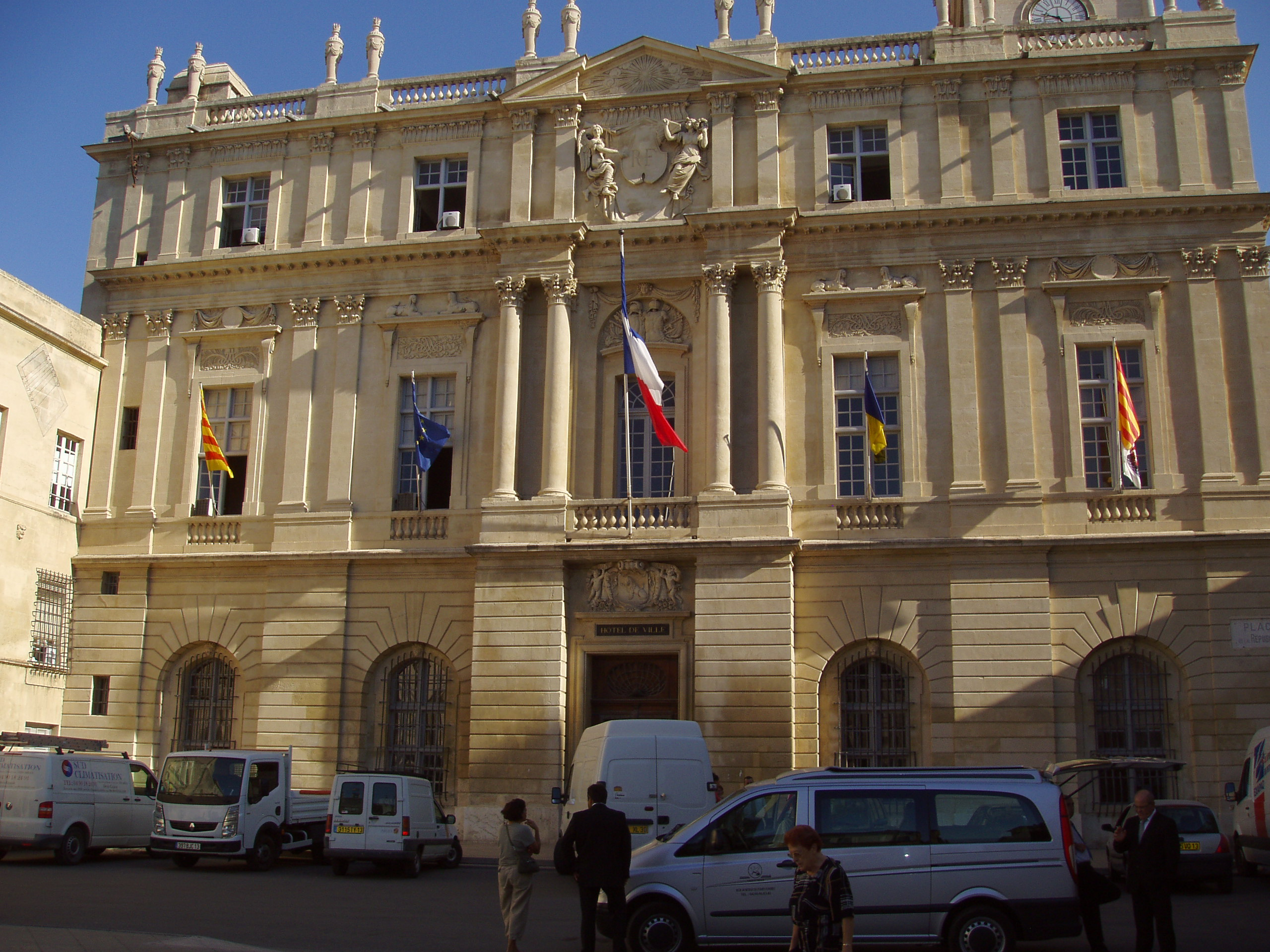 Arles (Bouches-du-Rhône, France), façade de l'hôtel de ville, place de la République.